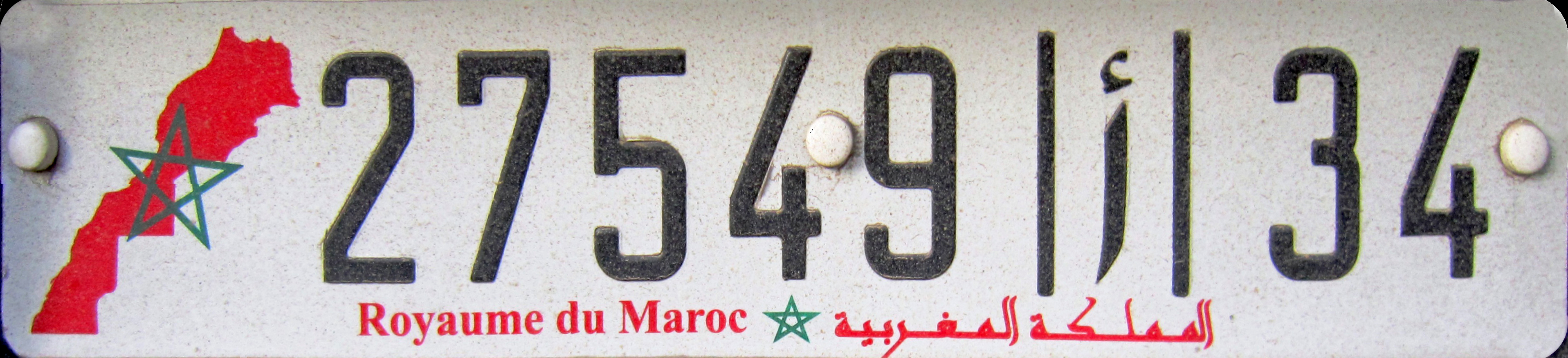 kentekenplaat Marokko 2